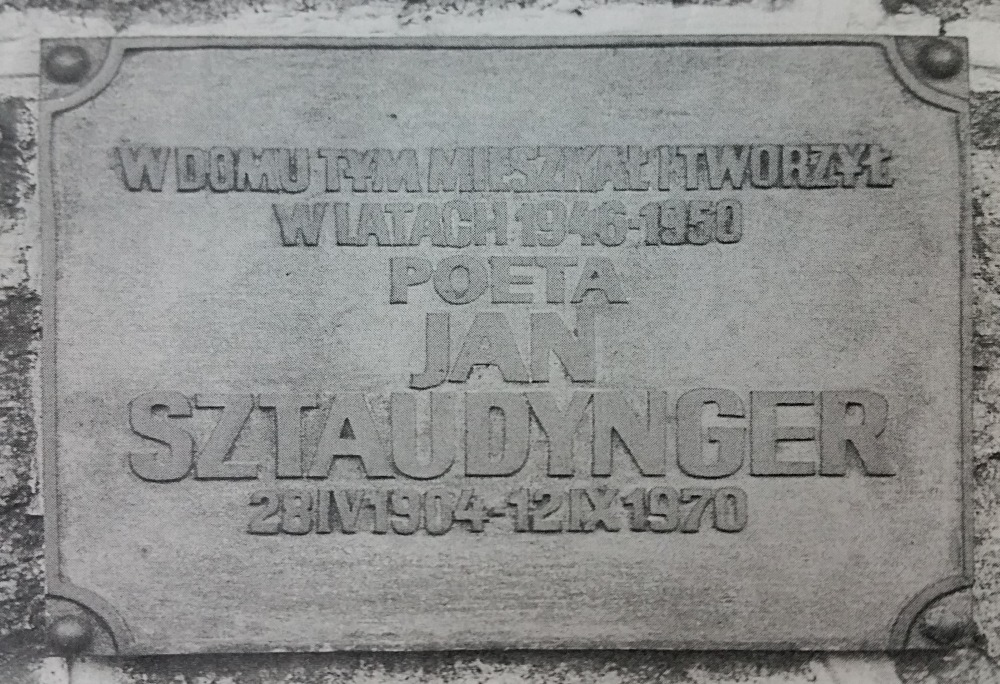 Nie istniejąca dziś tablica na domu w Szklarskiej Porębie, odsłonięta w połowie lat osiemdziesiątych.